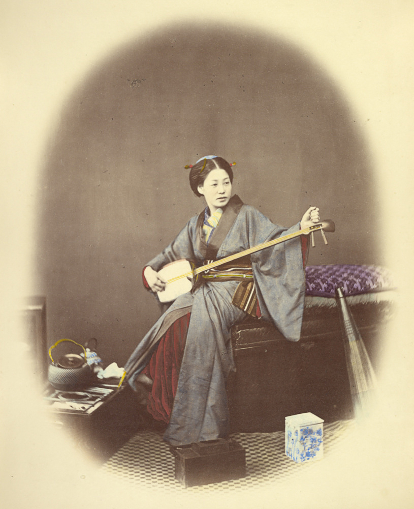 Jeune fille jouant du Shamisen. Photographie de Felice Beato (années 1860).